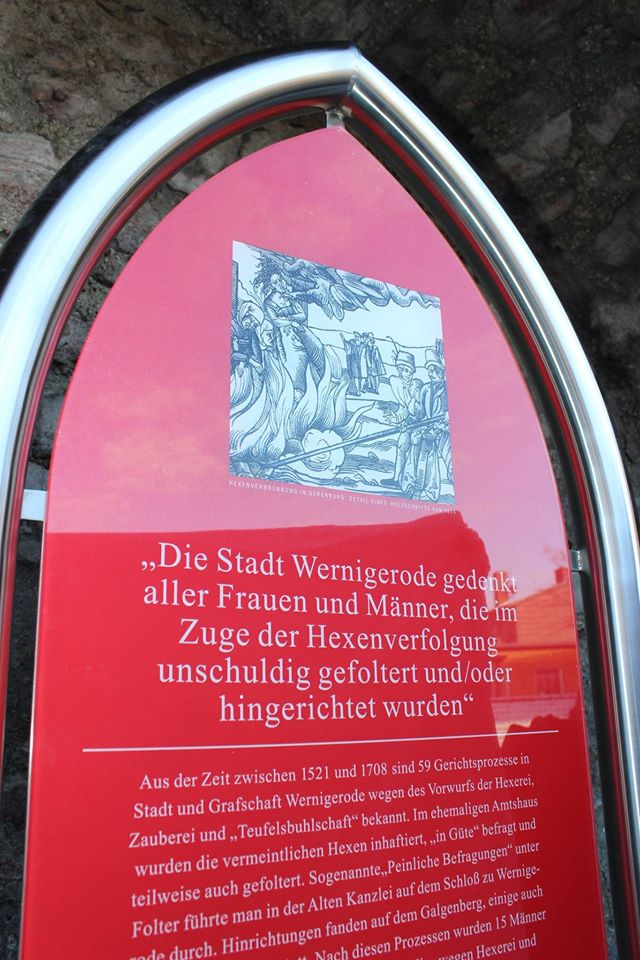 Gedenktafel an der historischen Stadtmauer beim alten Amtshaus für die Opfer der Hexenverfolgung in Wernigerode im Harz. Die Gedenktafel wurde am 21. Januar 2017 aufgestellt.